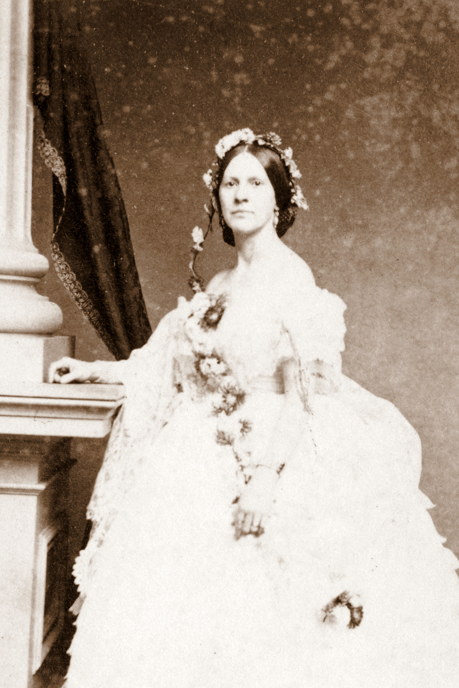 Virgina Clay-Clopton